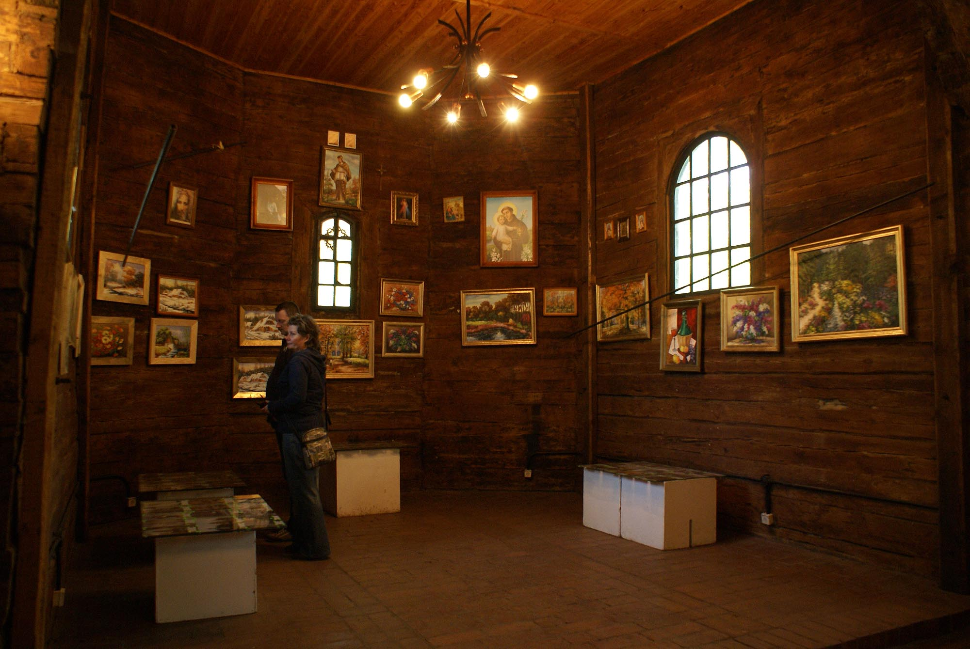 Wrocław, kościół p.w. św. Jana Nepomucena (św. Mikołaja ?), kon. XVI